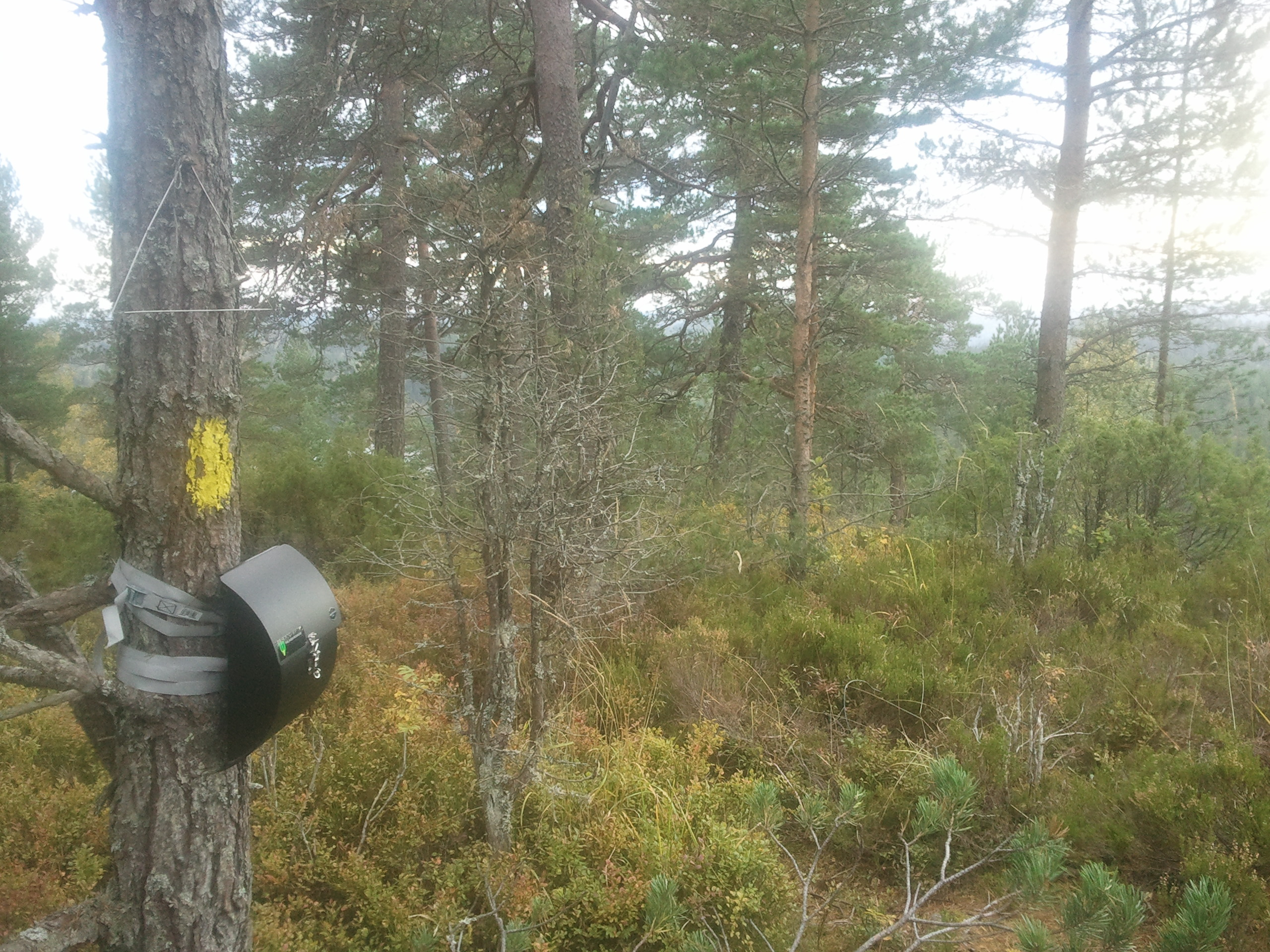 Posten på toppen av Hektnerhøgåsen, sett mot sør. Ramstadsjøen kan skimtes mellom trærne.